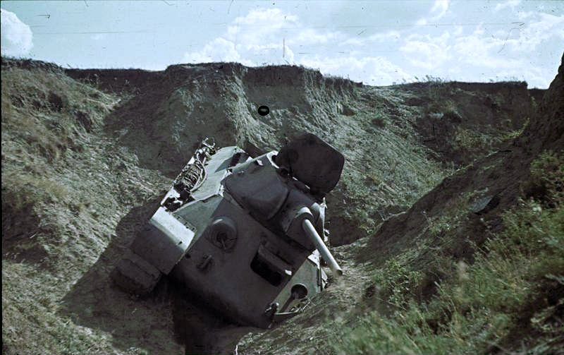 Abgeschossene sowjet. Panzer